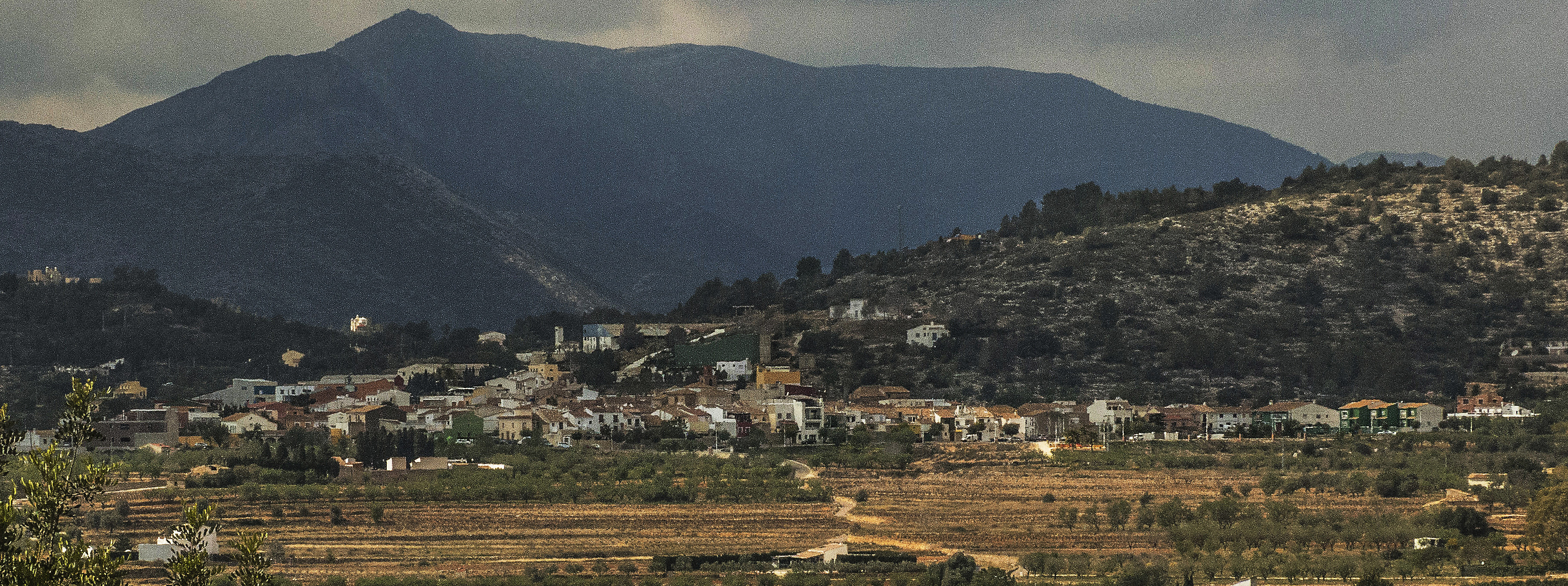 Panoràmica de Senija -Marina Alta-. Foto feta des de la Vallada Verda de Benissa.